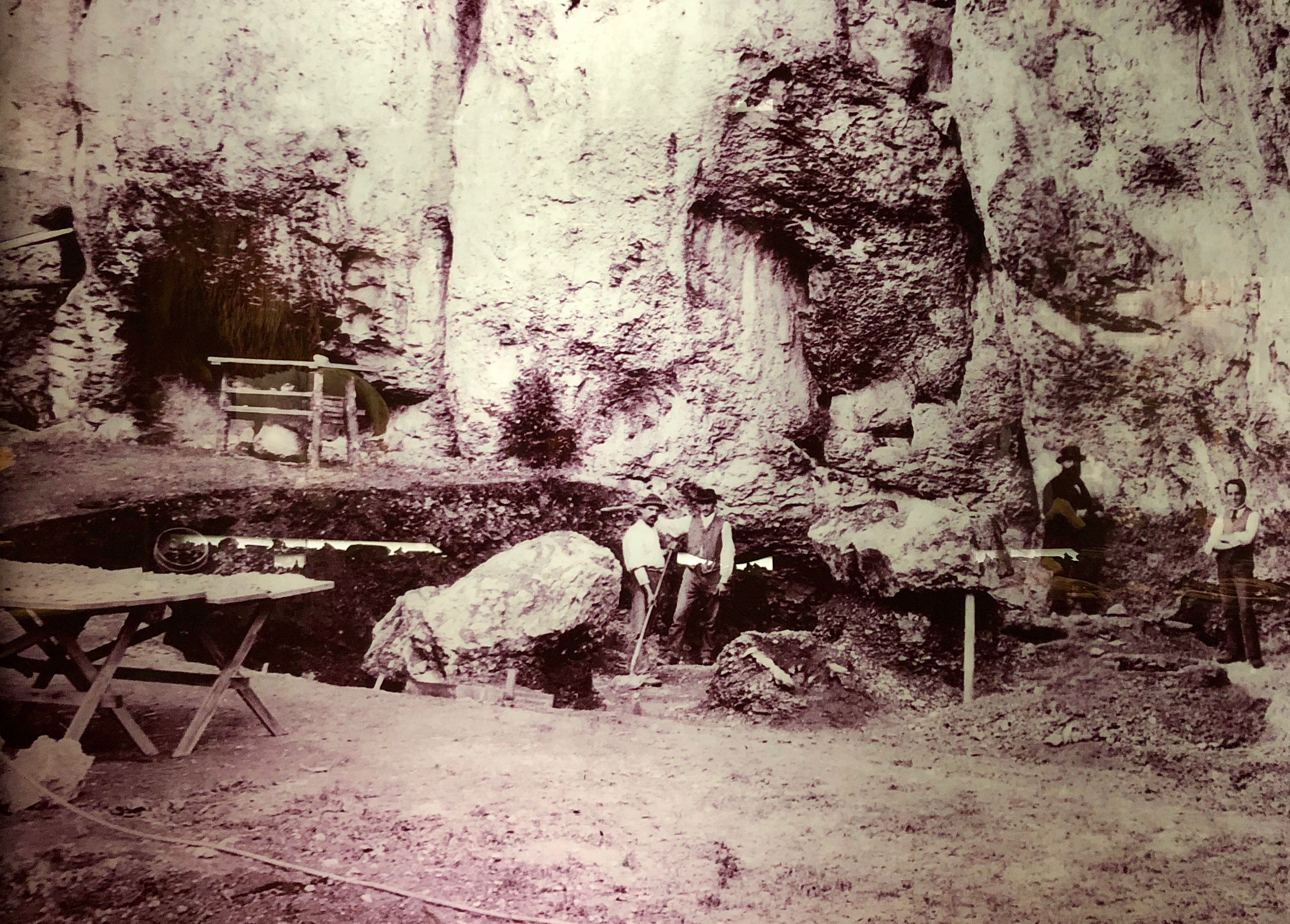 Modell eines prähistorischen Lagers in Schweizersbild